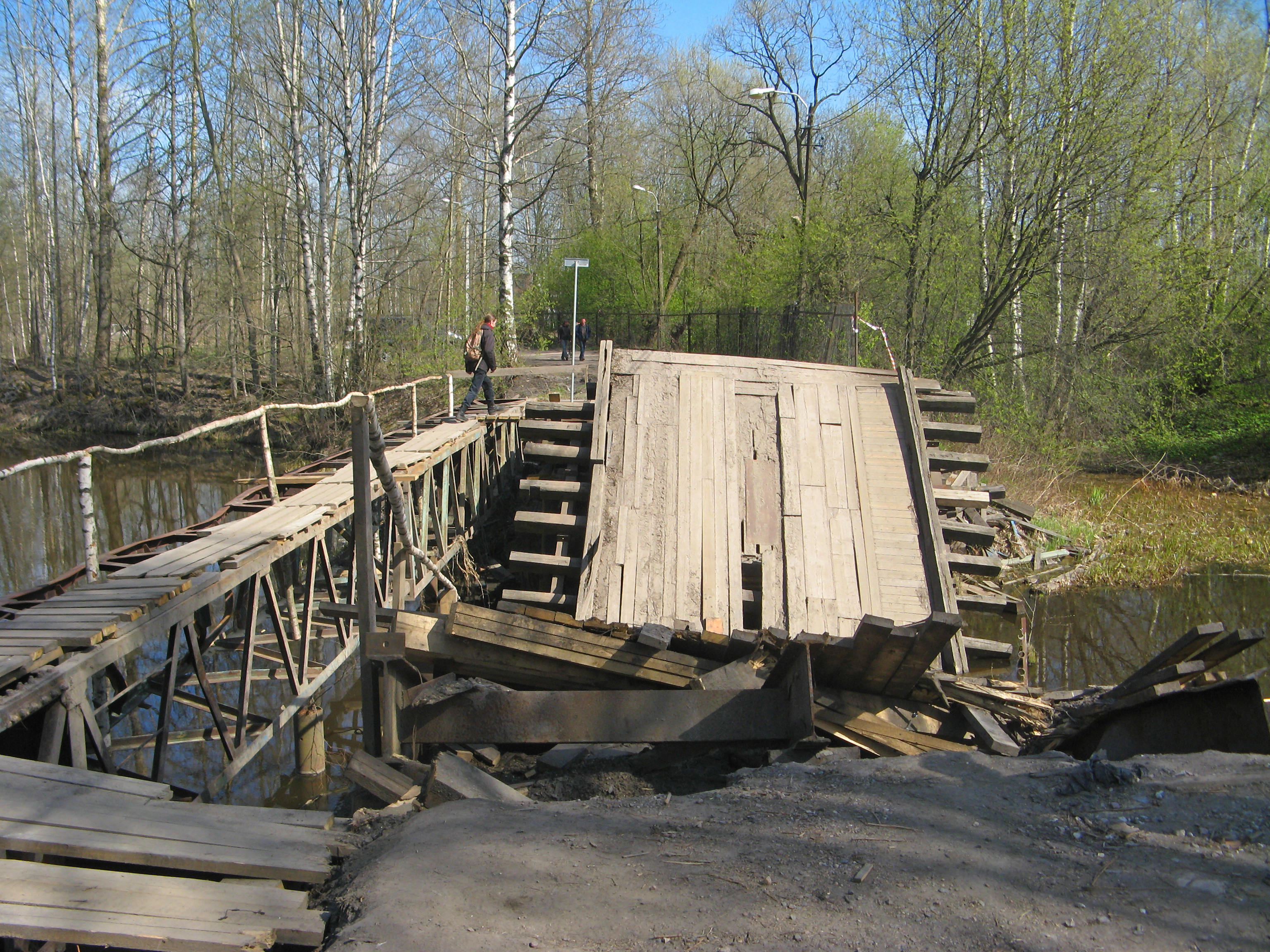 Сломанный мост через Безымянный ручей, Санкт-Петербург